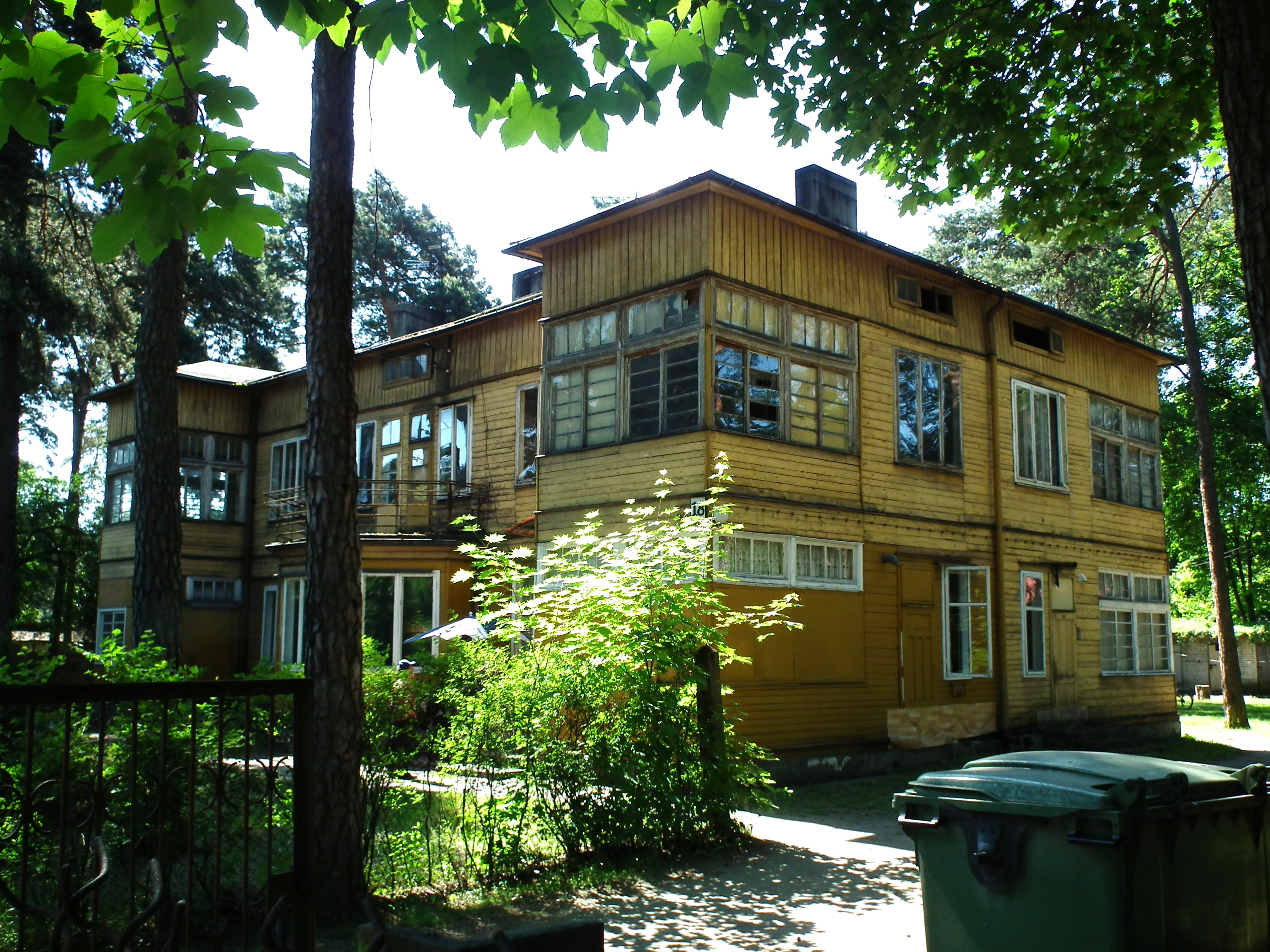 Stary, drewniany, modernistyczny pensjonat w Kolumnie.